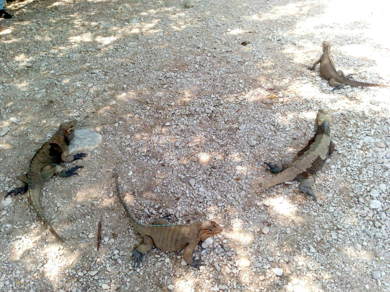 Iguanas en Lago Enriquillo en República Dominicana